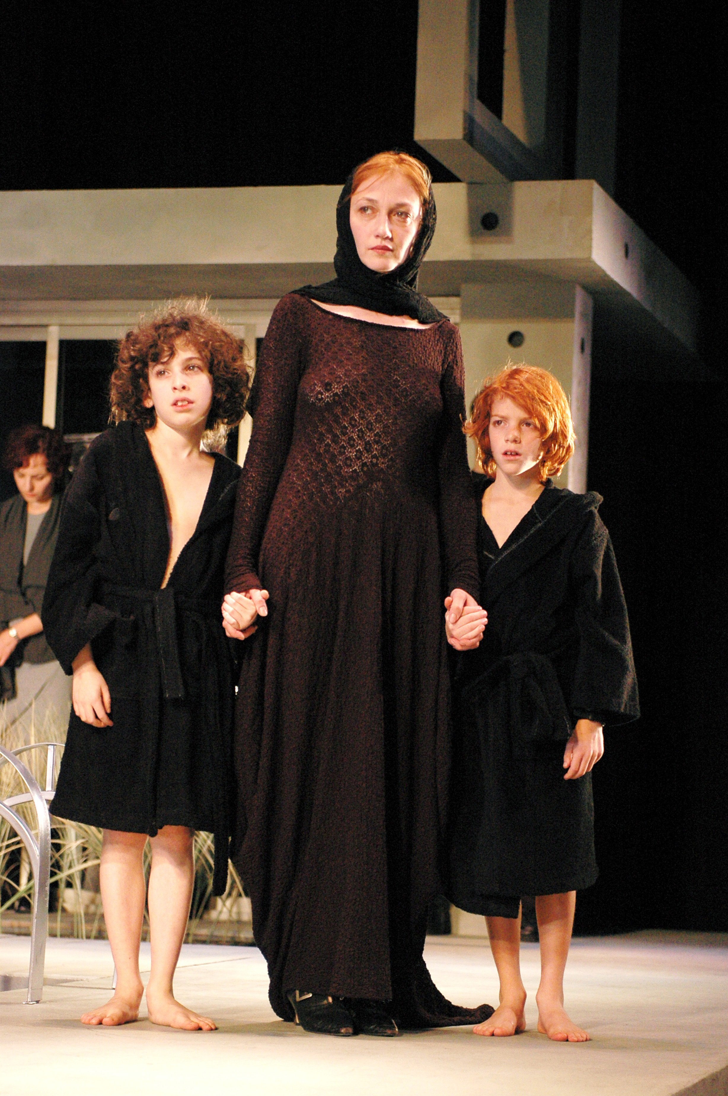 יבגניה דודינה, יובל שבח ויהונתן פרנקו בהצגה מדיאה, תיאטרון גשר